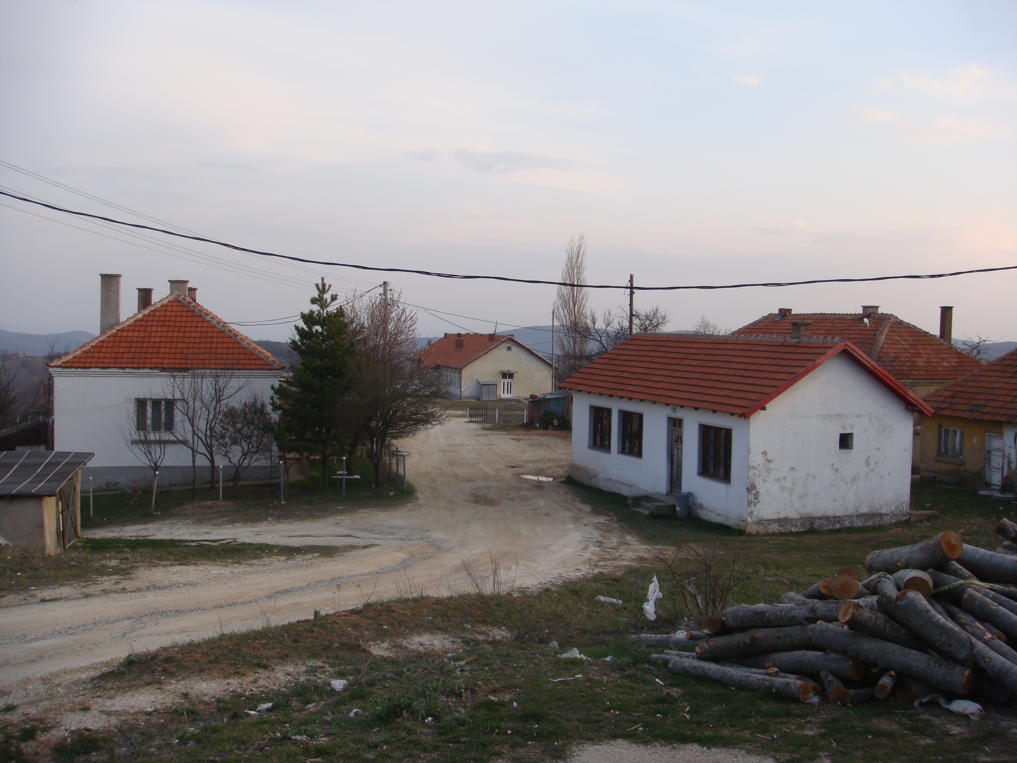 Novo Brdo